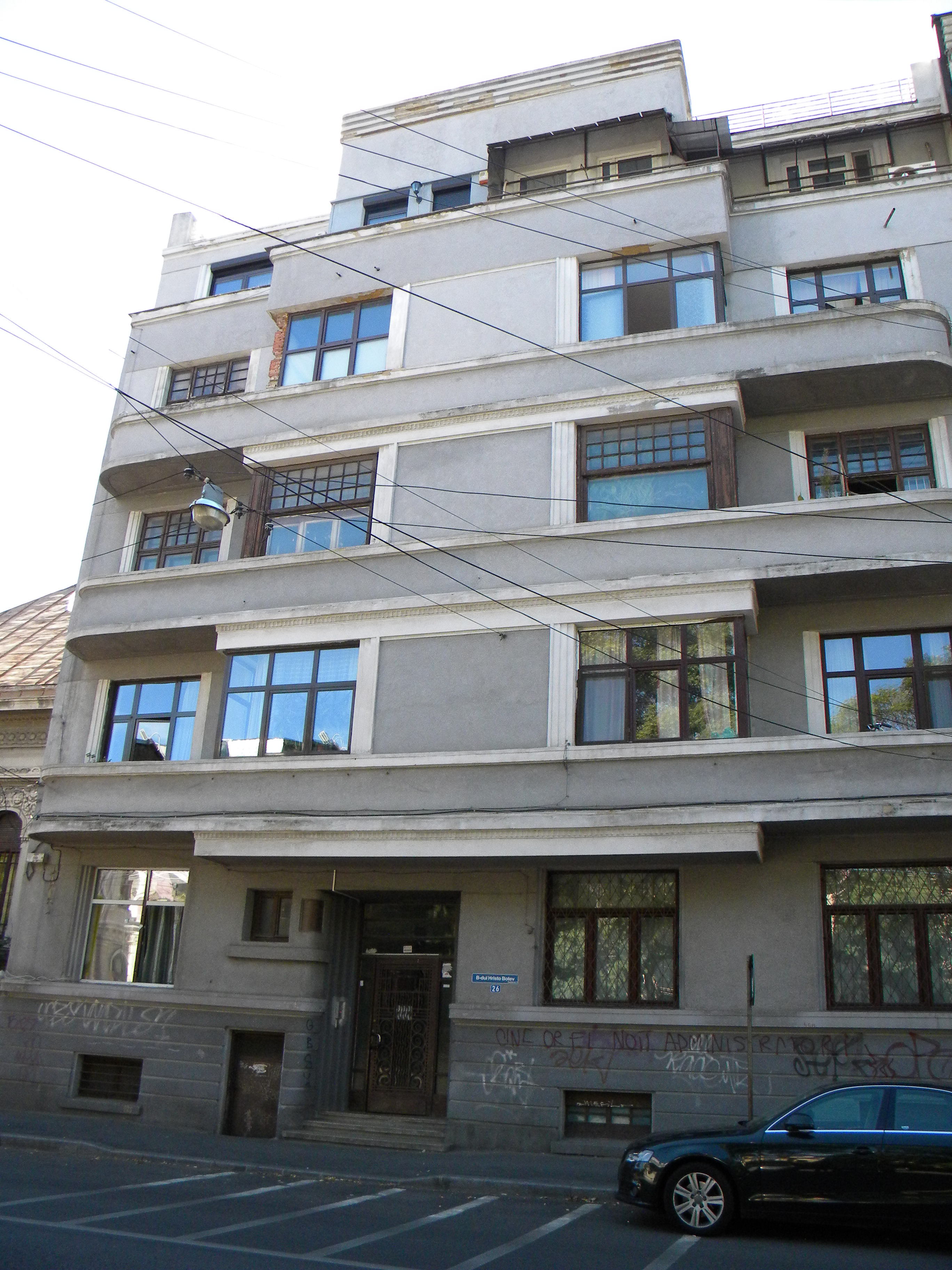 Bucuresti, Romania, Strada Hristo Botev nr. 26 (imobil) sect. 3